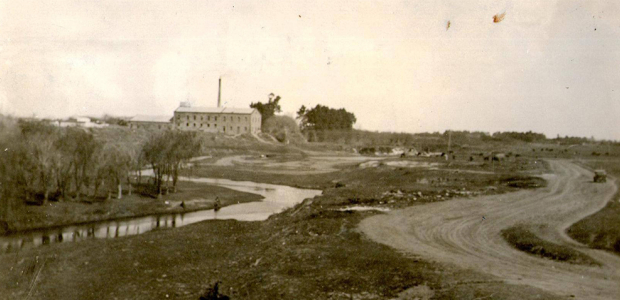 Manzanares (Buenos Aires) - Molino Bancalari - Imagen de 1887